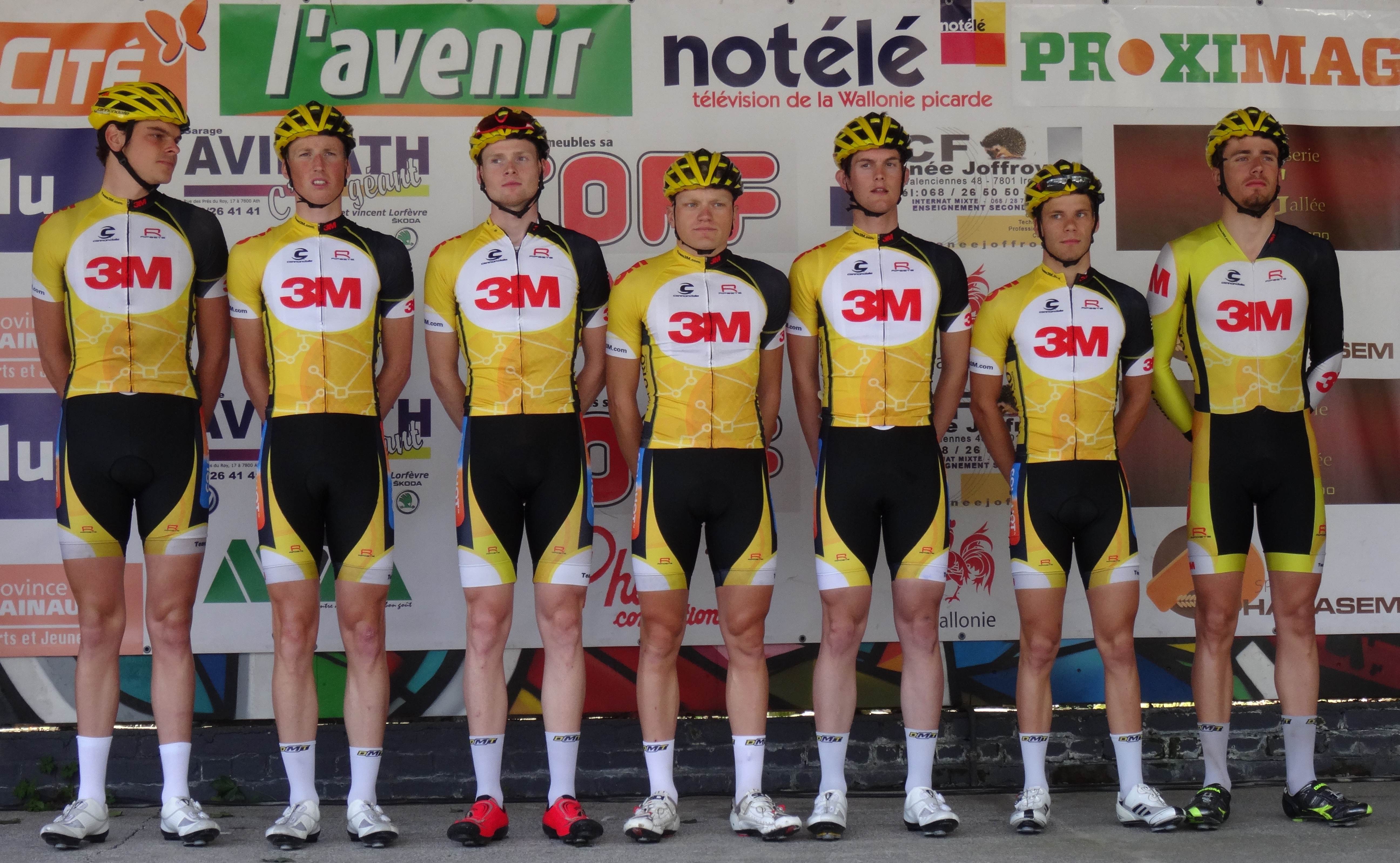 Triptyque des Monts et Châteaux 2014, étape 2b, 5 avril 2014, départ d'Estaimbourg. Depicted people: Tim Vanspeybroeck, Sebastiaan Pot, Stef Van Zummeren, Gerry Druyts, Christophe Sleurs, Gregory Franckaert and Gertjan De Vos Depicted team: 3M no fallback page found for autotranslate (base=By courtesy of Triptyque des Monts et Châteaux 2014, lang=en)